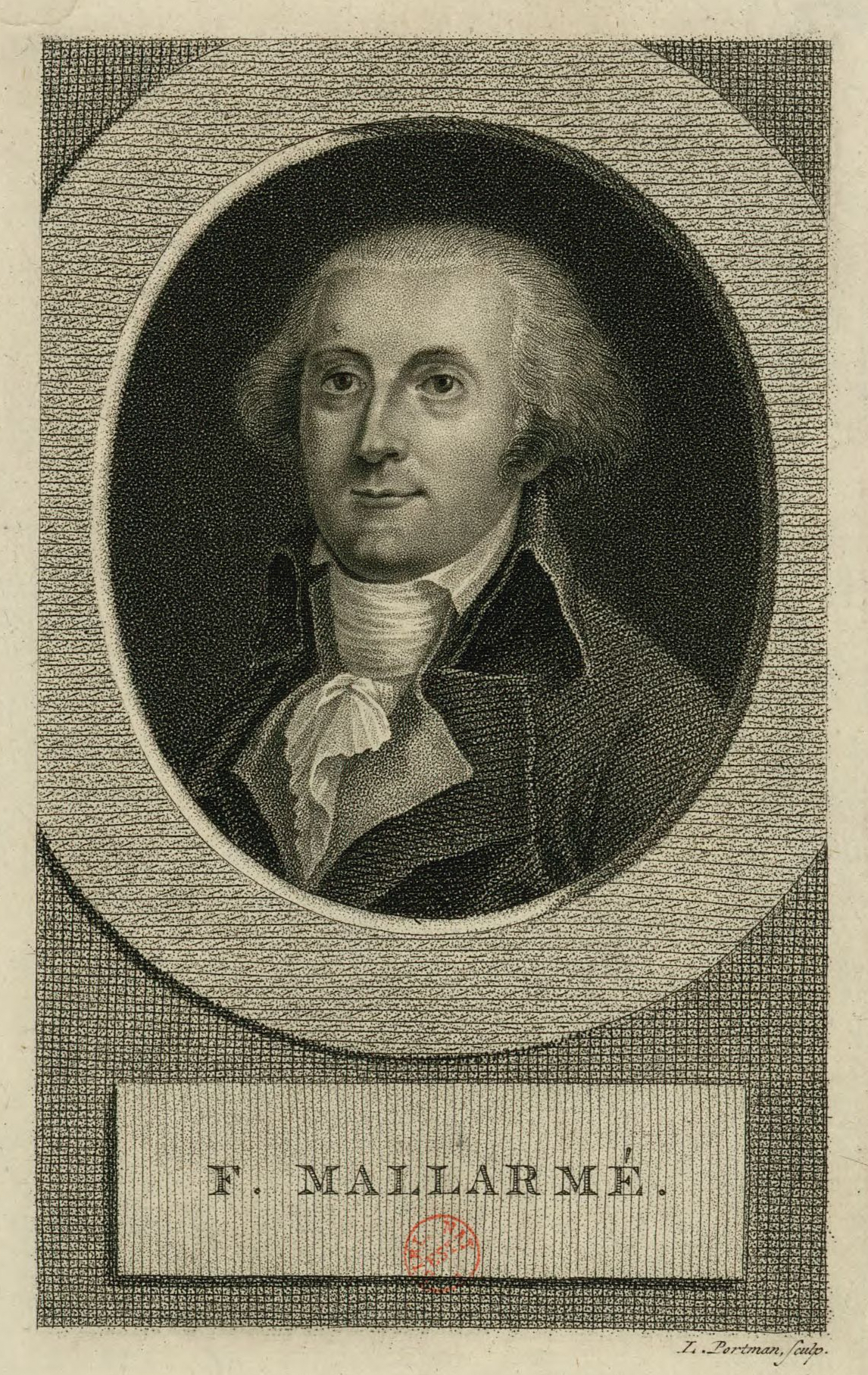 [Recueil. Collection de Vinck. Un siècle d'histoire de France par l'estampe, 1770-1870. Vol. 16 (pièces 2536-2759), Ancien Régime et Révolution]